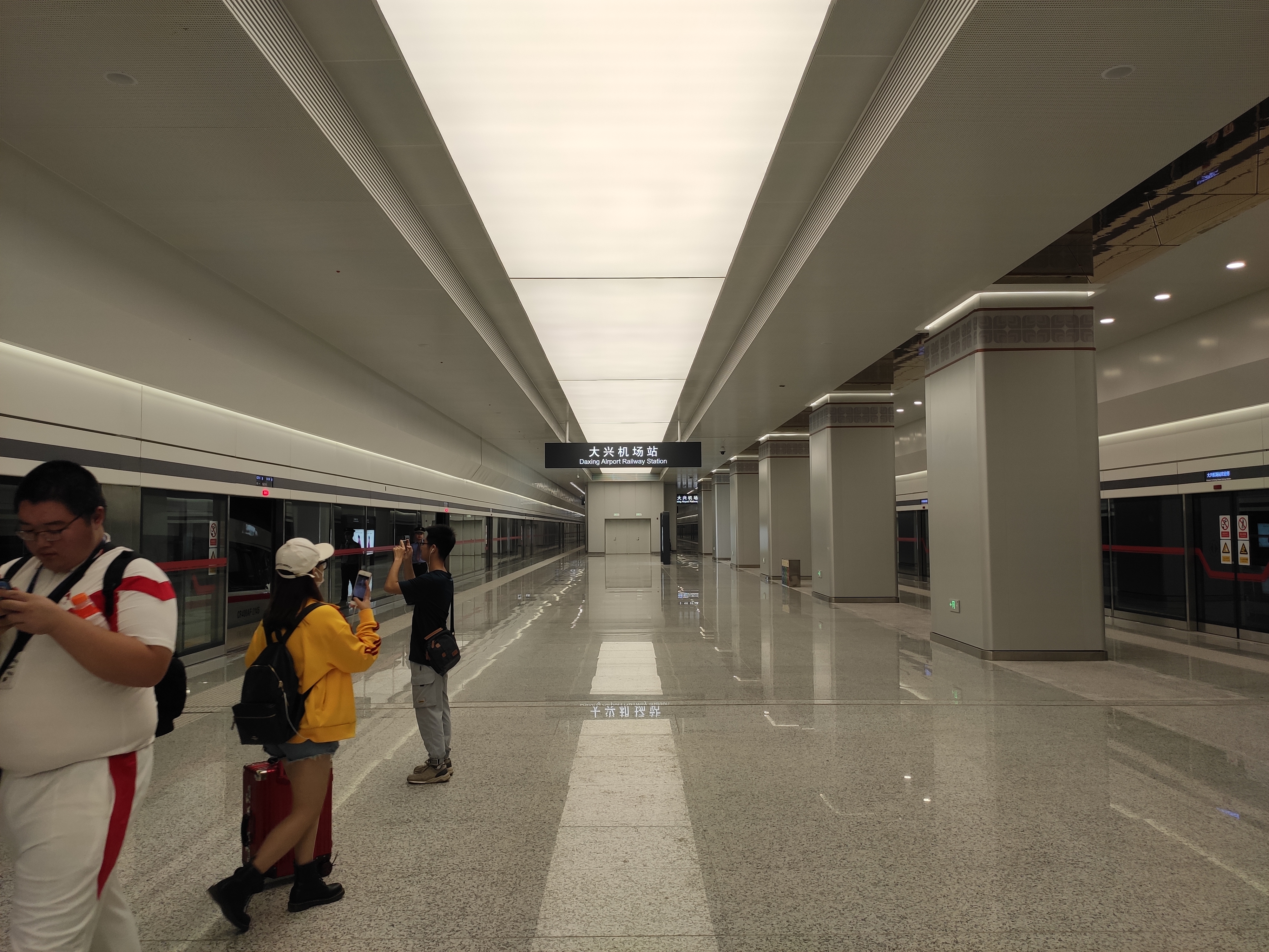 我国特色。